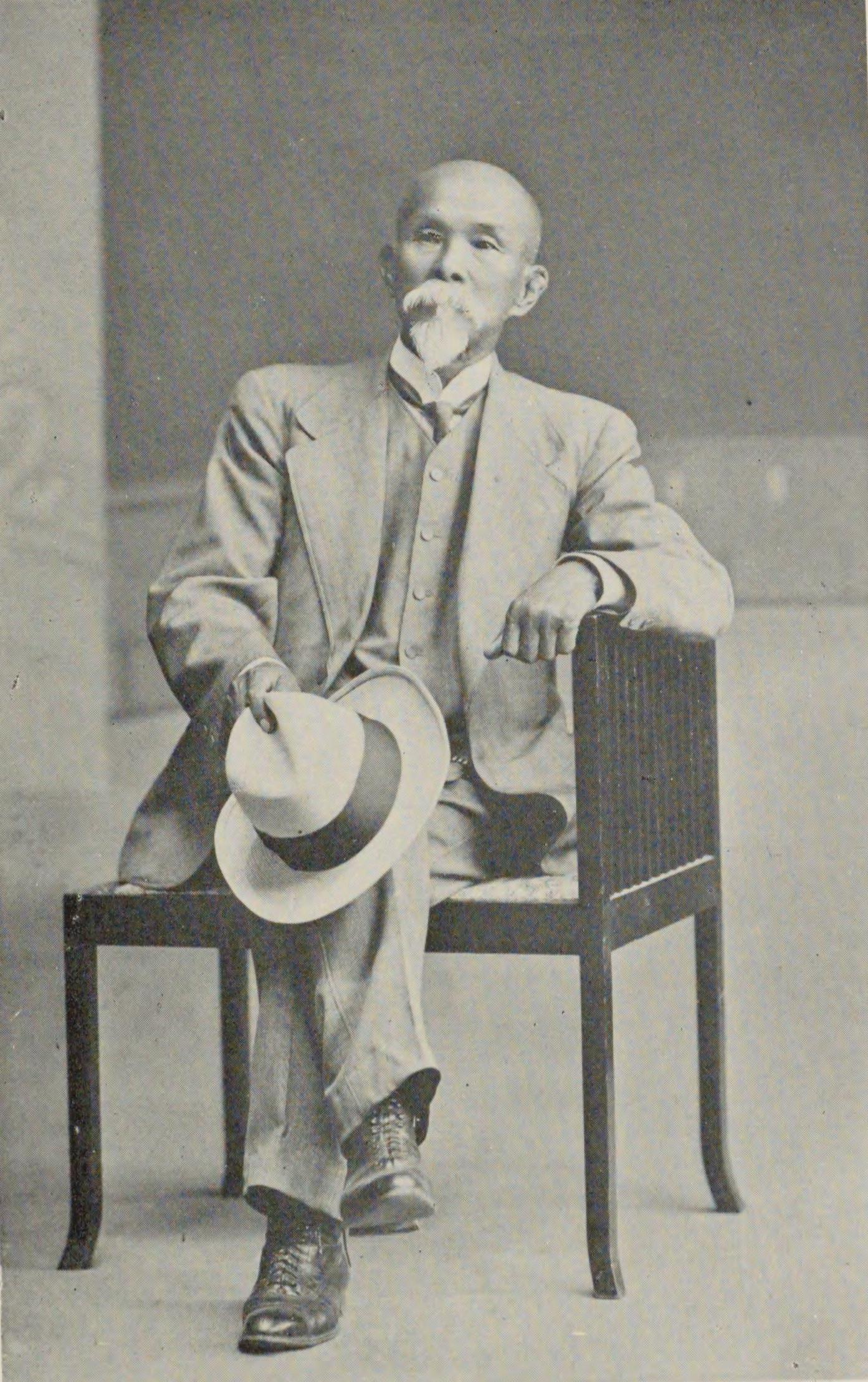 一瀬勇三郎翁